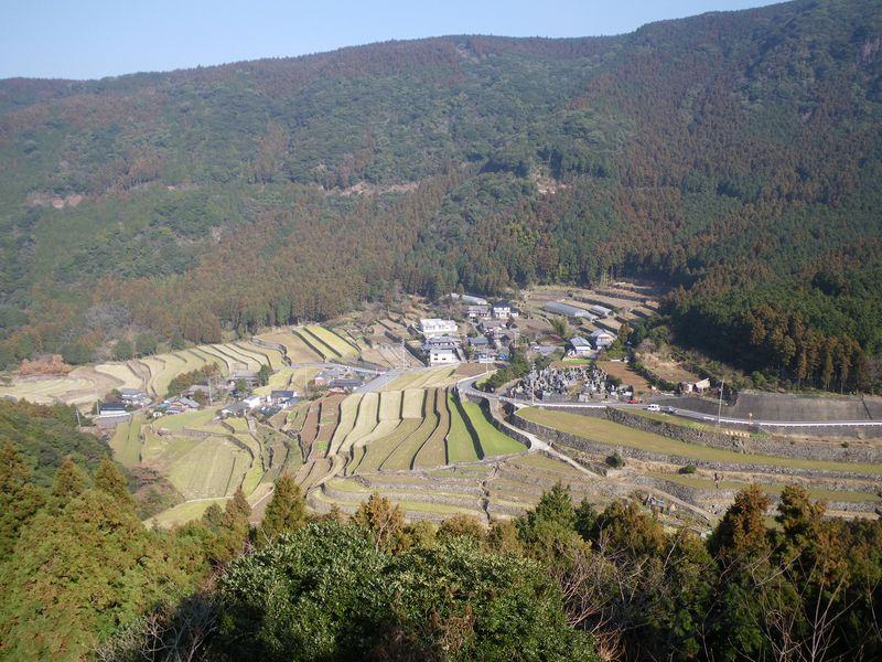 清水棚田。長崎県雲仙市千々石町（Shimizu tanada,Chijiwa,Unzen city,Nagasaki）